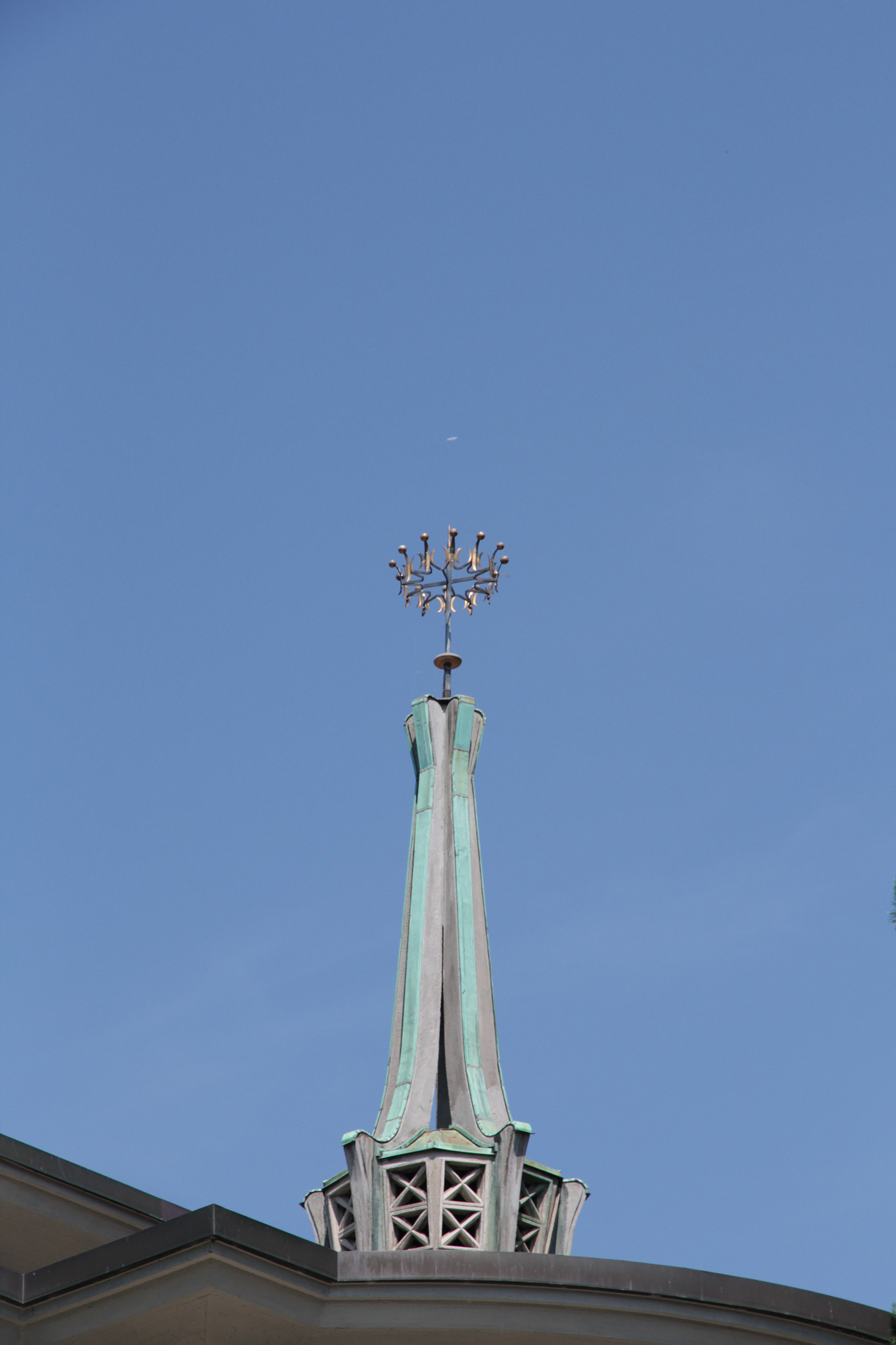 Römisch-katholische Kirche Dreikönigen, Zürich-Enge